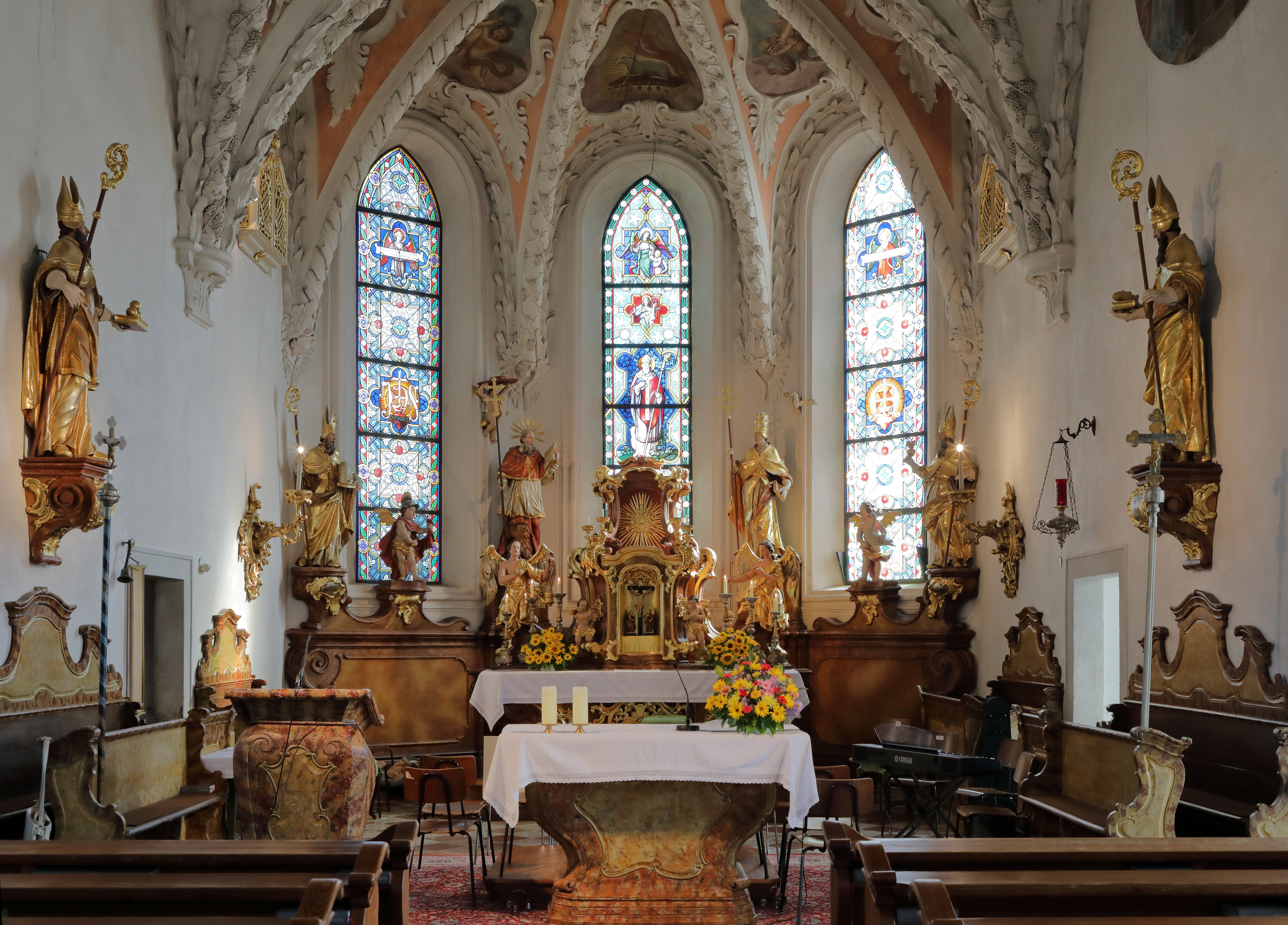 Blick in Richtung Chorraum in der röm.-kath. Pfarrkirche hl. Martin in der oberösterreichischen Gemeinde Kematen an der Krems. Die Hochaltarfiguren des barocken Marienaltar sind Werke des Bildhauers Johann Georg Schwanthaler und stellen die lateinischen Kirchenväter dar. Von links nach rechts: Ambrosius (Bischof mit Bienenkorb in der Hand), Hieronymus (Kardinal mit Löwen zu seinen Füßen), Gregor d. Große (Papst mit Heilig-Geist-Taube - schräg über seinem Kopf), Augustinus v. Hippo (Bischof mit (brennendem) Herzen in der Hand). Die Statue links an der Wand ist ein Nikolaus v. Myra (Bischof mit drei Kugeln in der Hand) und rechts Ulrich von Augsburg (Bischof mit Fischen).